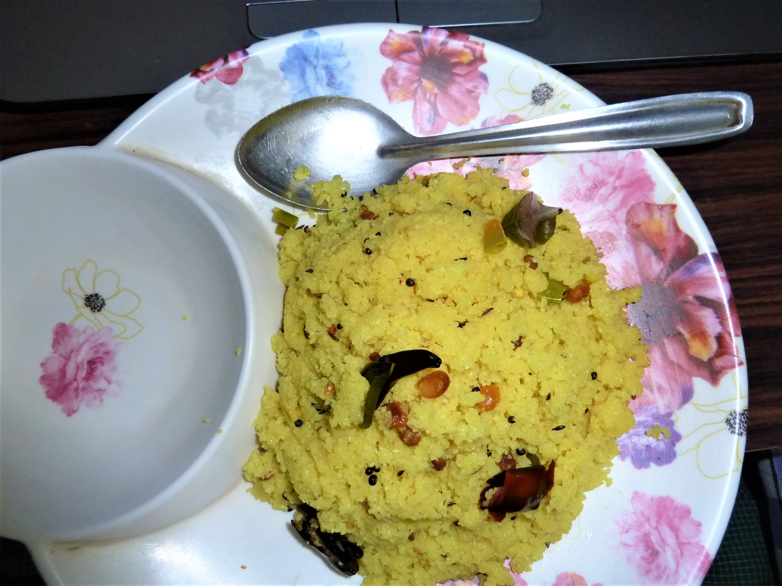 రవ్వ పులిహోర